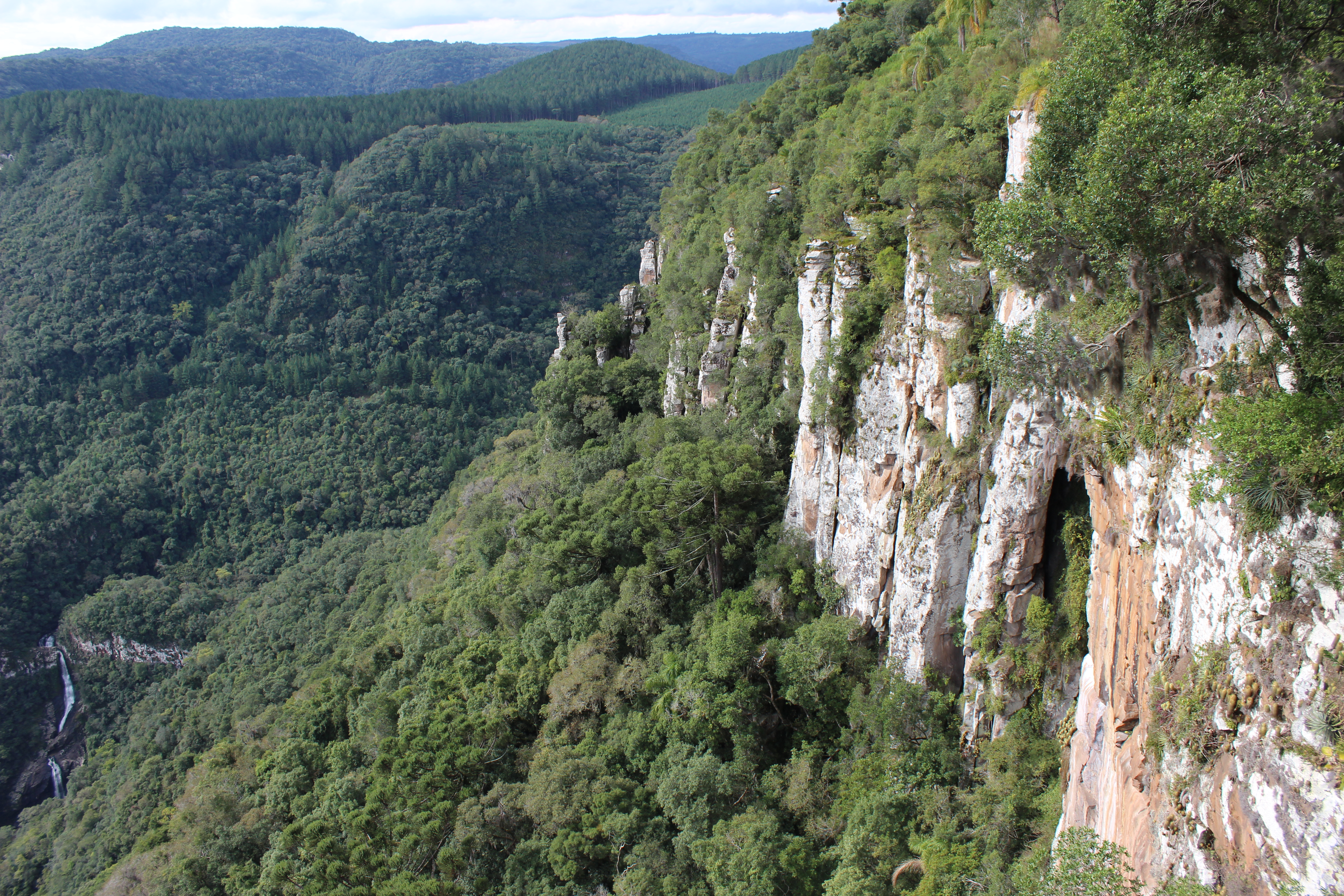 Paredão visto do primeiro mirante do Canyon da Ferradura, Canela - RS